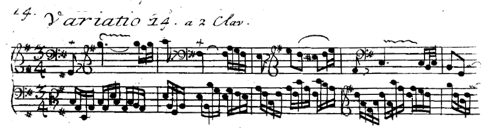 Beginn der Variatio14 aus den "Goldbergvariationen" BWV 988